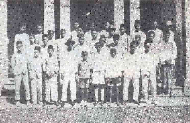 Standard Keenam (Sekolah Rendah), 1926, Maxwell School, KL